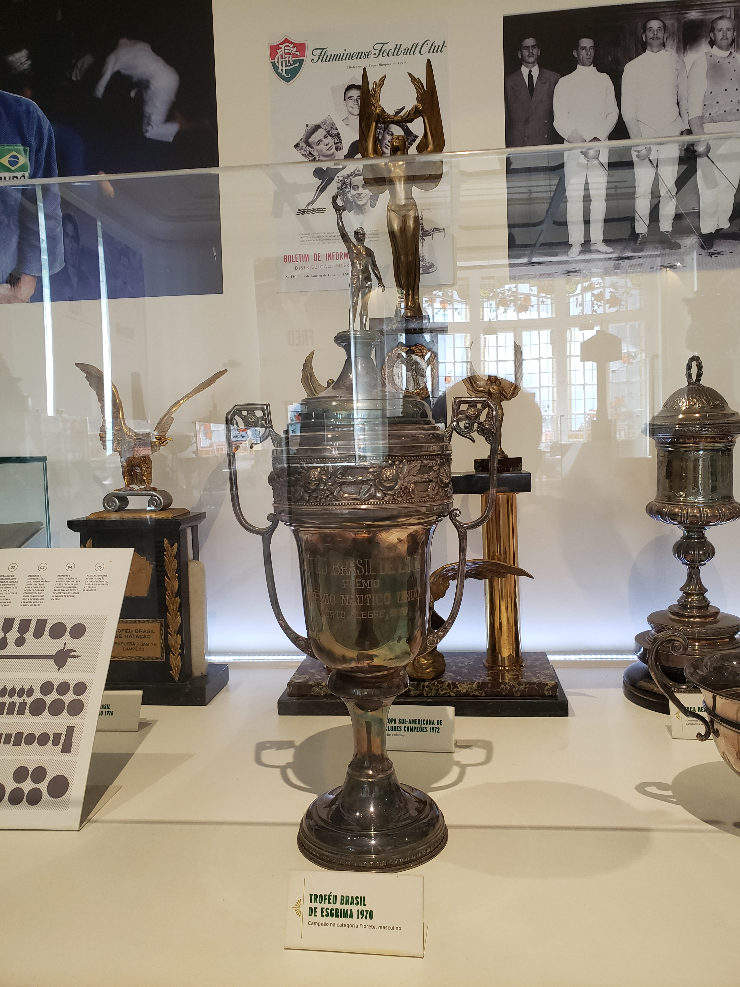 Taça Brasil de Esgrima 1970, conquistada pelo Fluminense Football Club.